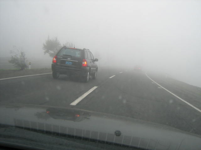 Zona de Neblina en la Ruta 001 (Perú) de la Carretera Panamericana.